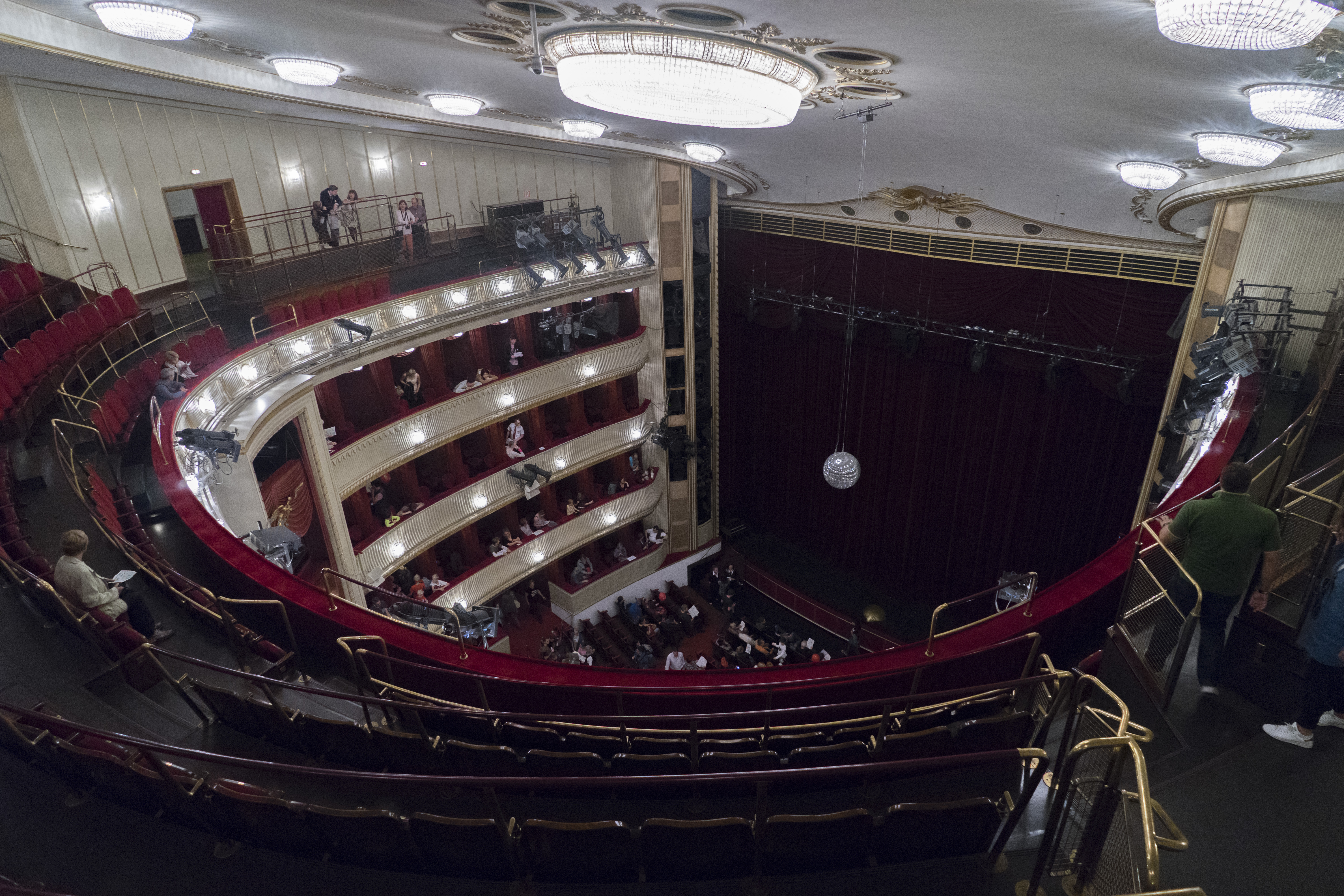 Burgtheater